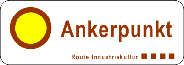 Infosymbol Ankerpunkt der Route der Industriekultur